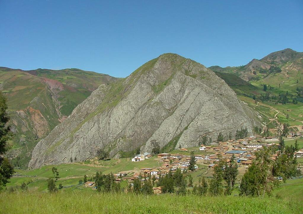 El hermoso pueblo de Angasmarca situado en la andina provincia Santiago de Chuco región La Libertad en el norte del Perú